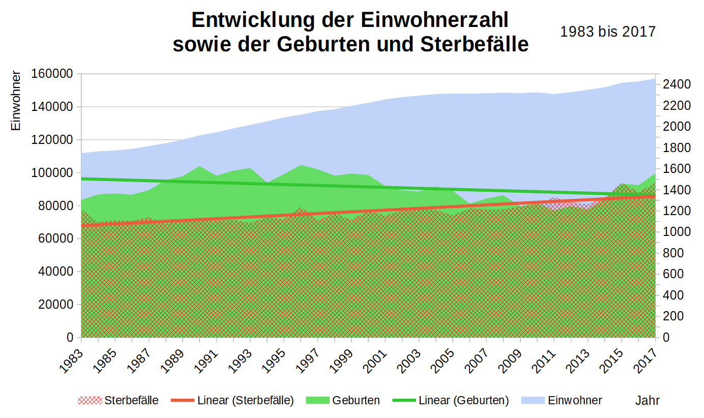 Diese Graphik zeigt die Einwohnerentwicklung des Landkreises Landshut von 1983 bis 2017 und setzt sie in Bezug zu den Geburten und Sterbefällen. Neben der Darstellung des Einwohneranstieges, wird der gegenläufige Trend hinsichtlich der Entwicklung der Geburten und Sterbefälle anschaulich. Die Datenbasis entstammt dem Bayerischen Landesamt für Statistik.